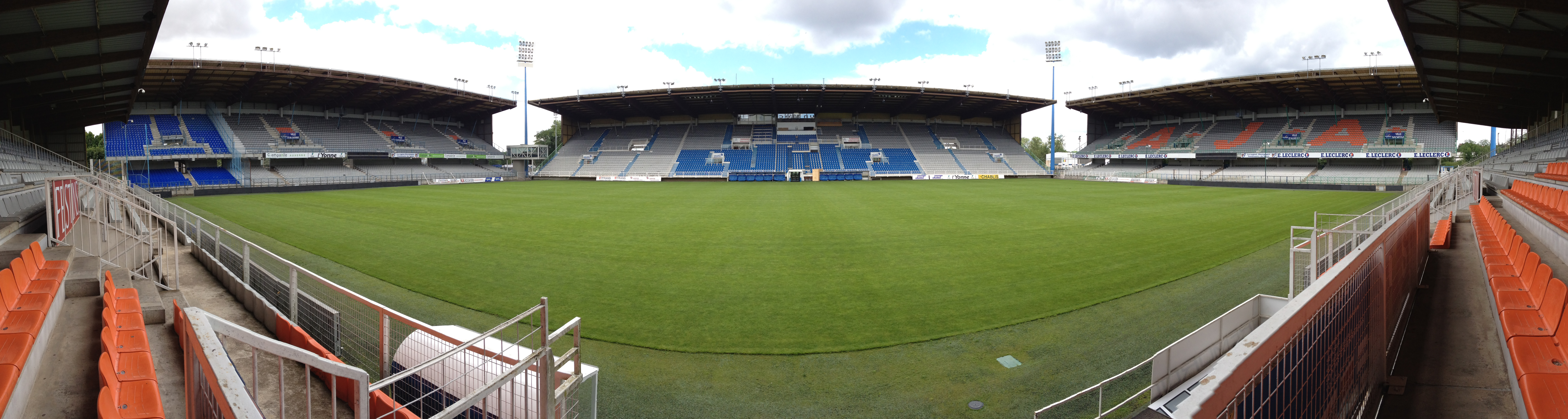 Panorama Stade de Abbé-Deschamps